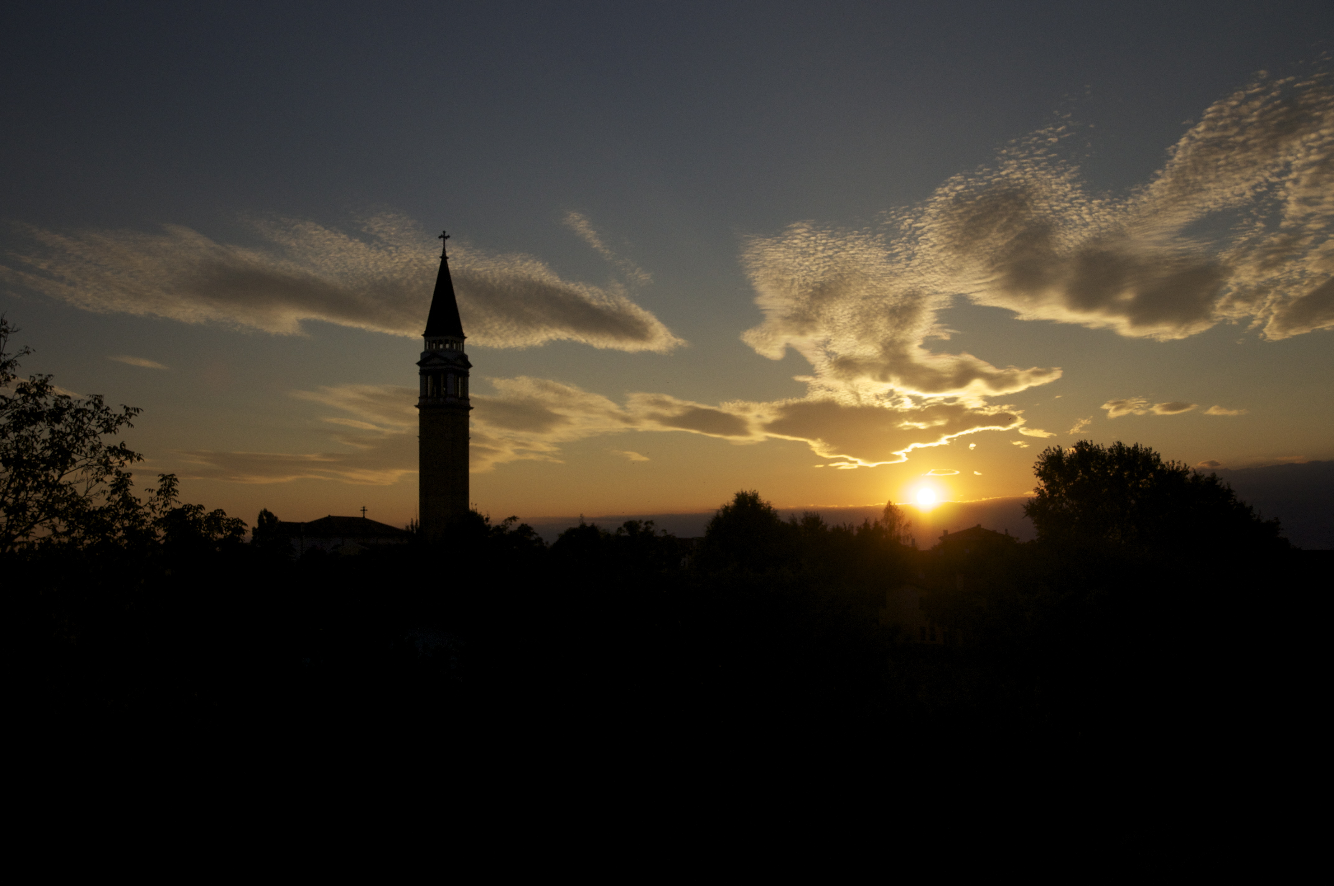 Tramonto a Fossalta di Piave (Venezia, Italia)